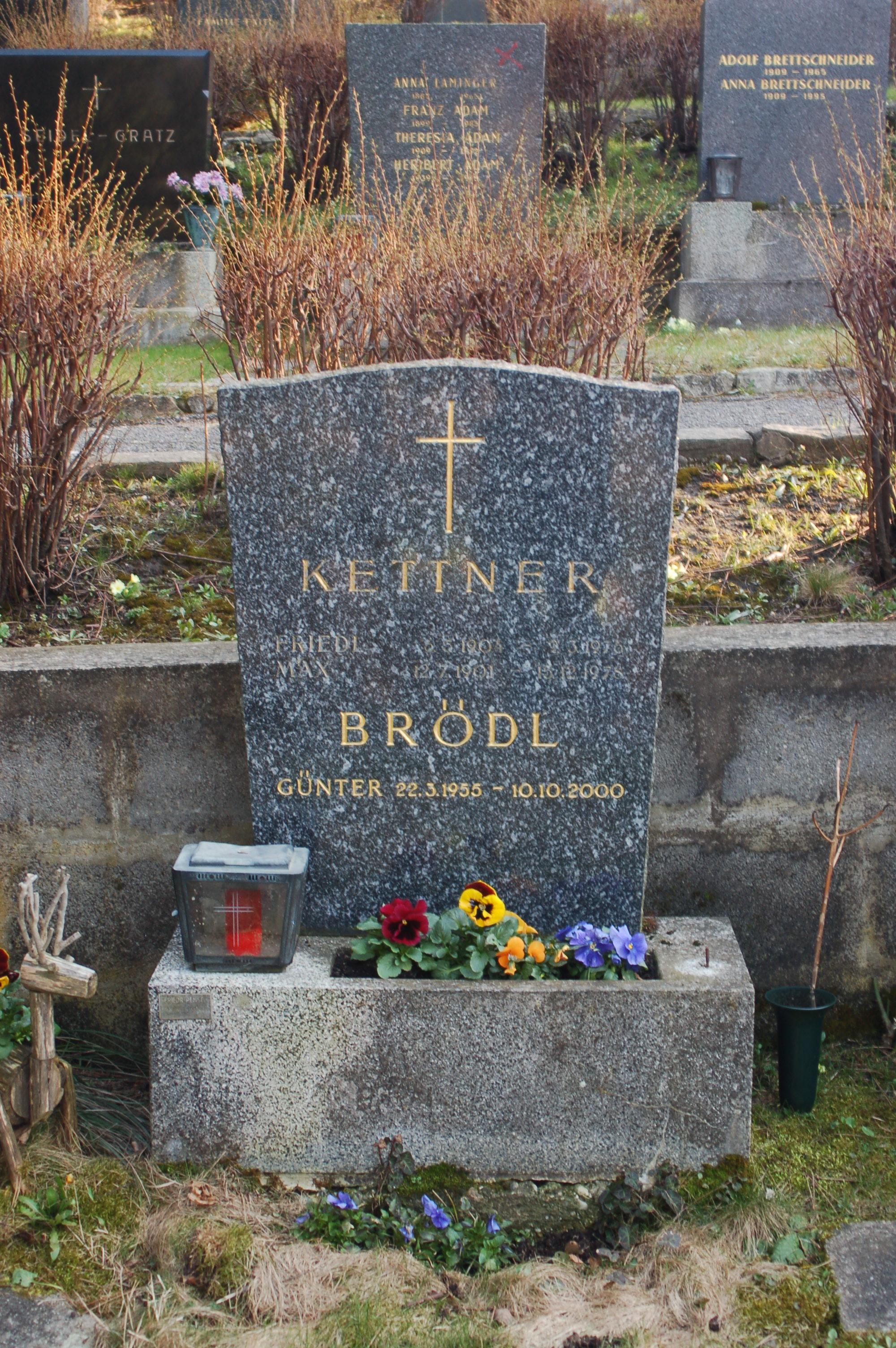 Neustifter Friedhof, Grabstätte von Günter Brödl (Ehrengrab der Stadt Wien)